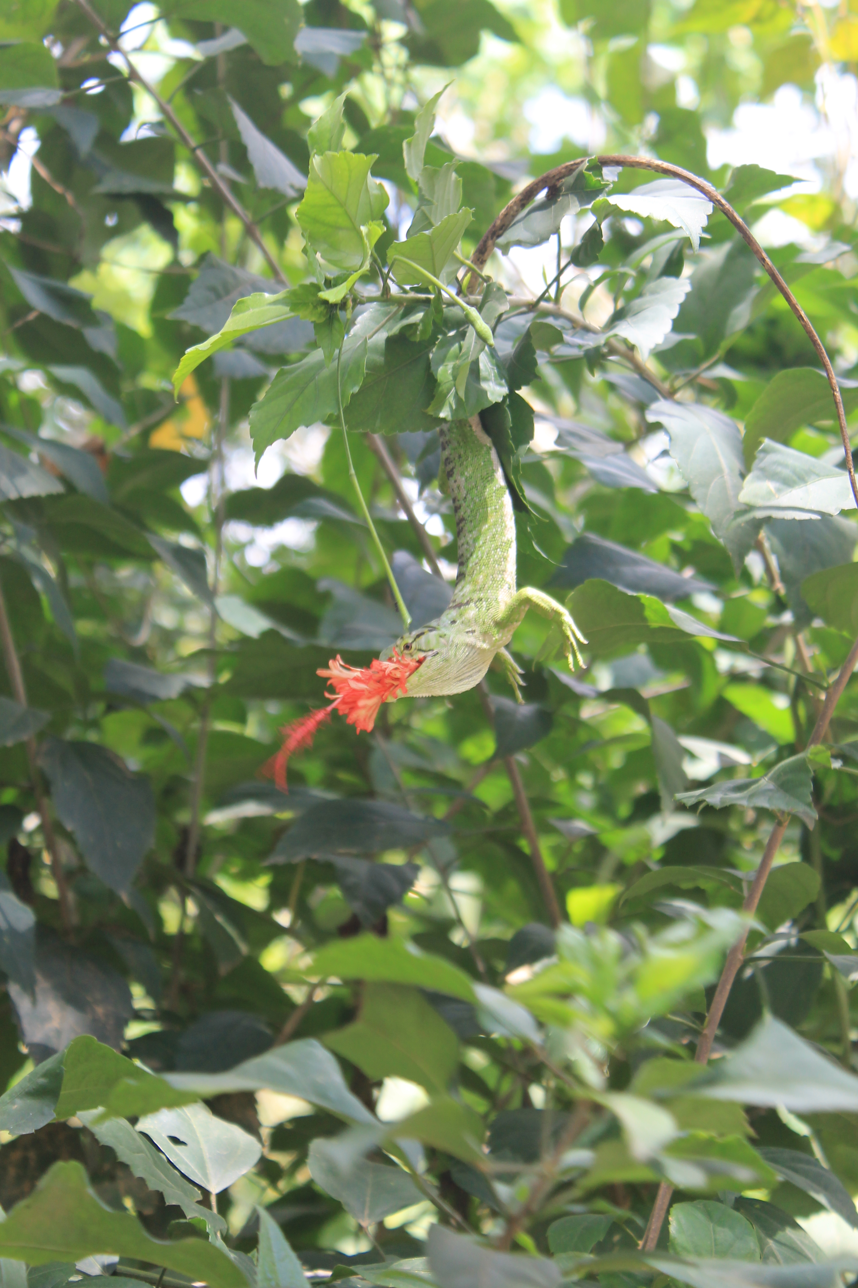 Imóvel e em curiosa posição de ponta-cabeça, um lagarto "papa-vento verde" (Polychrus marmoratus) abocanha uma flor do gênero "hibiscus". Município de Pacoti, Estado do Ceará, Brasil. Área de Proteção Ambiental da Serra de Baturité.